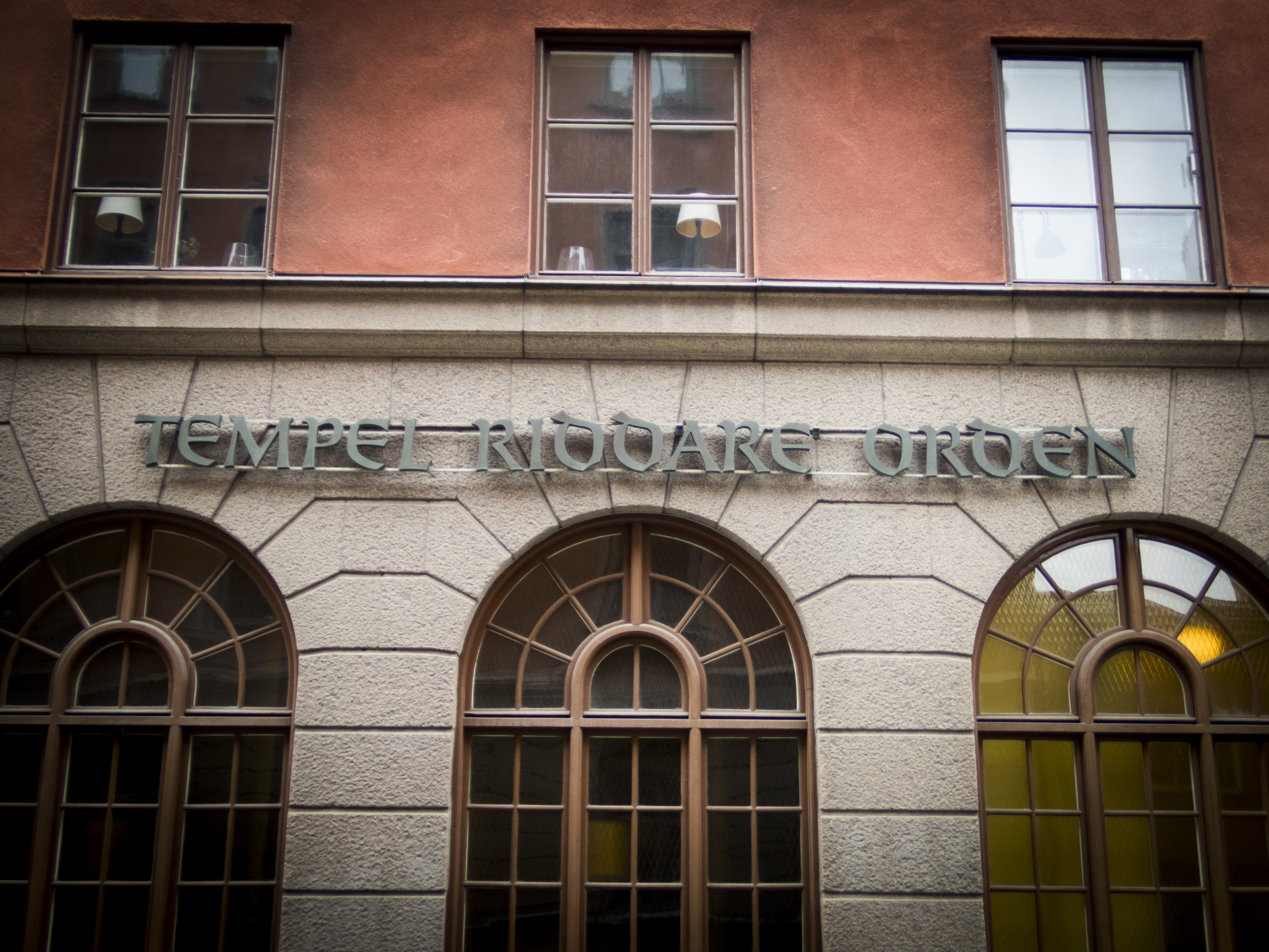 Tempel Riddare Orden, Kammakargatan 54-56 Stockholm